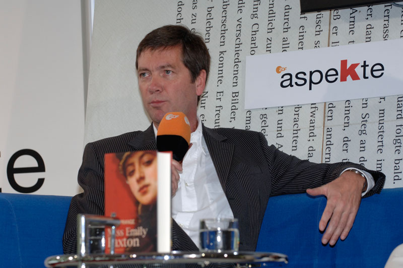 Peter Prange